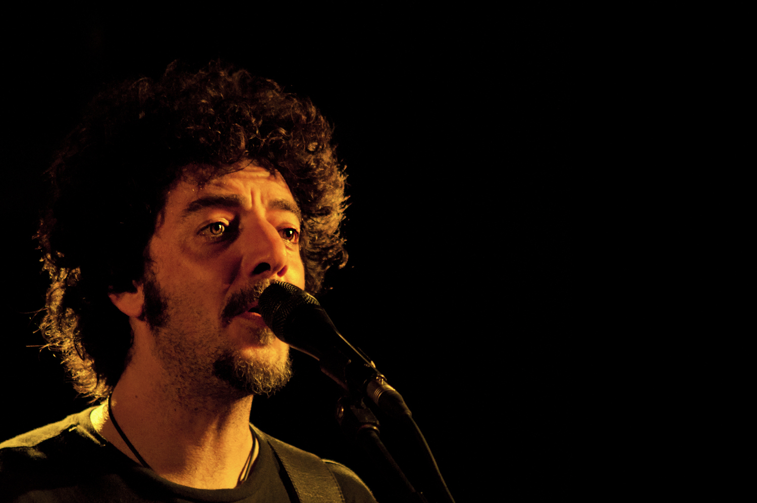 Max Gazzè in un concerto a Camposano